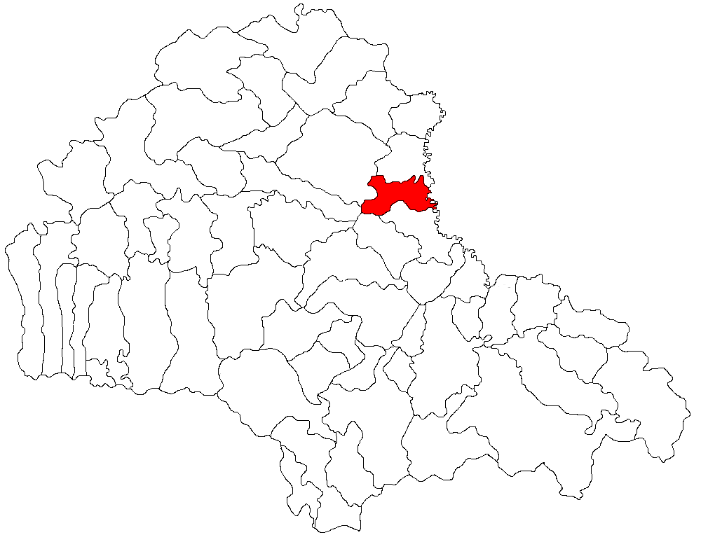 Categorie:Hărţi ale judeţului Braşov